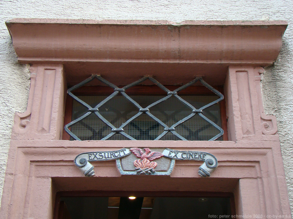 Darstellung eines Phoenix am Portal der historischen Stadtapotheke in Kraichtal-Gochsheim